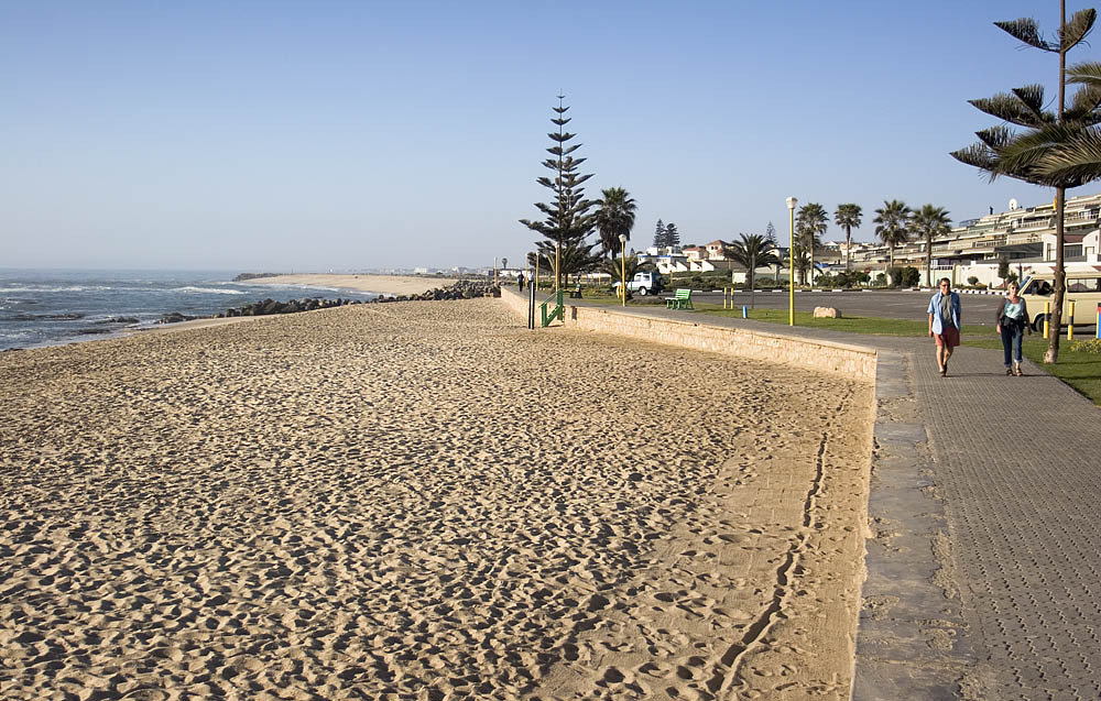 Swakopmund Beach, Namibia